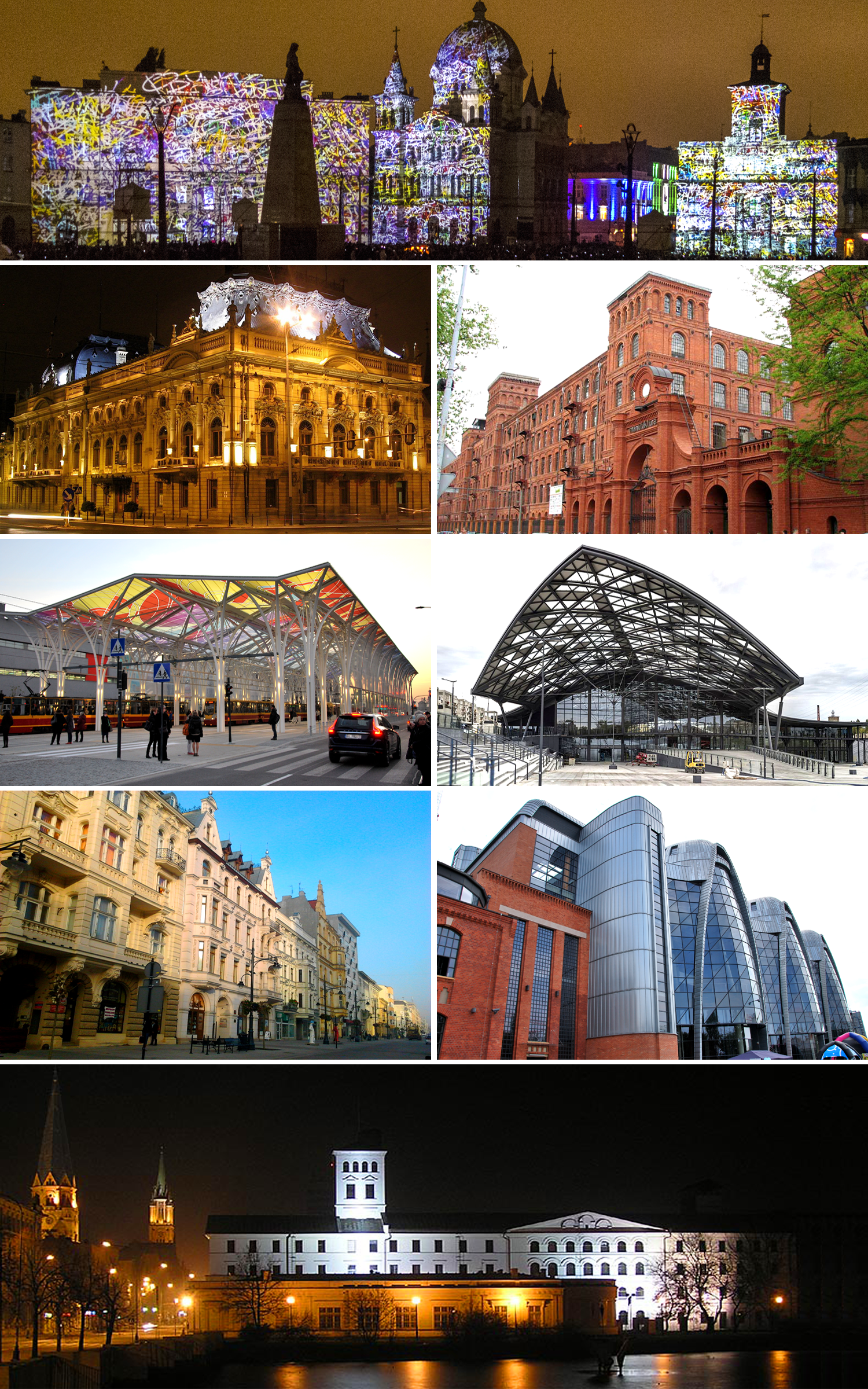 Niezwykłe piękno Łodzi 2017 (Unusual beauty of Lodz 2017)